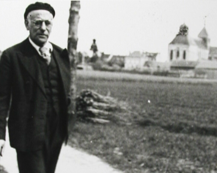 Max Jacob devant l'Abbaye de Saint-Benoît-sur-Loire (photogramme extrait du documentaire)